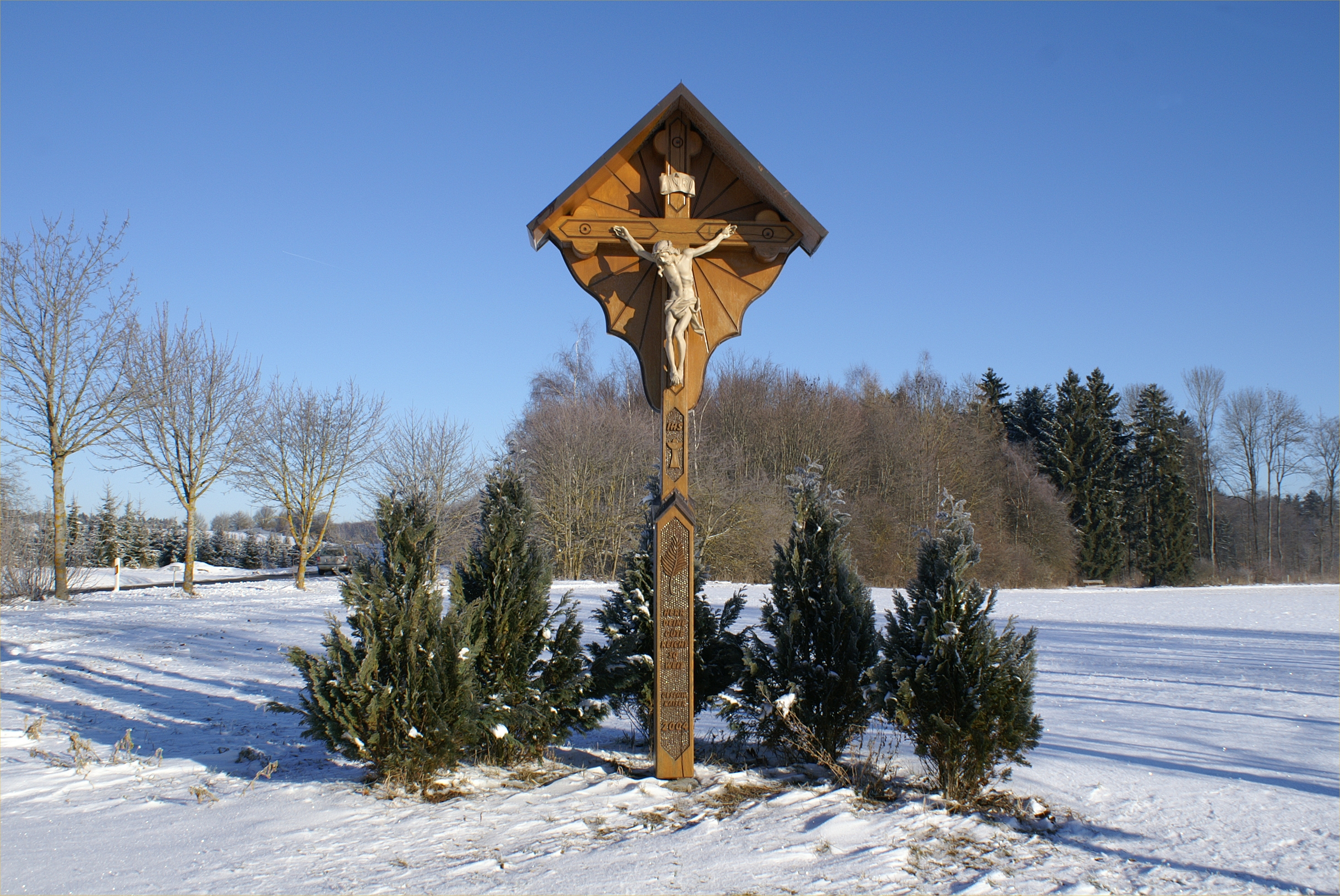 Feldkreuz in Ingstetten im Alb-Donau-Kreis